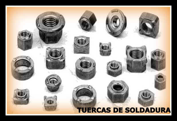 Tornillos y tuercas